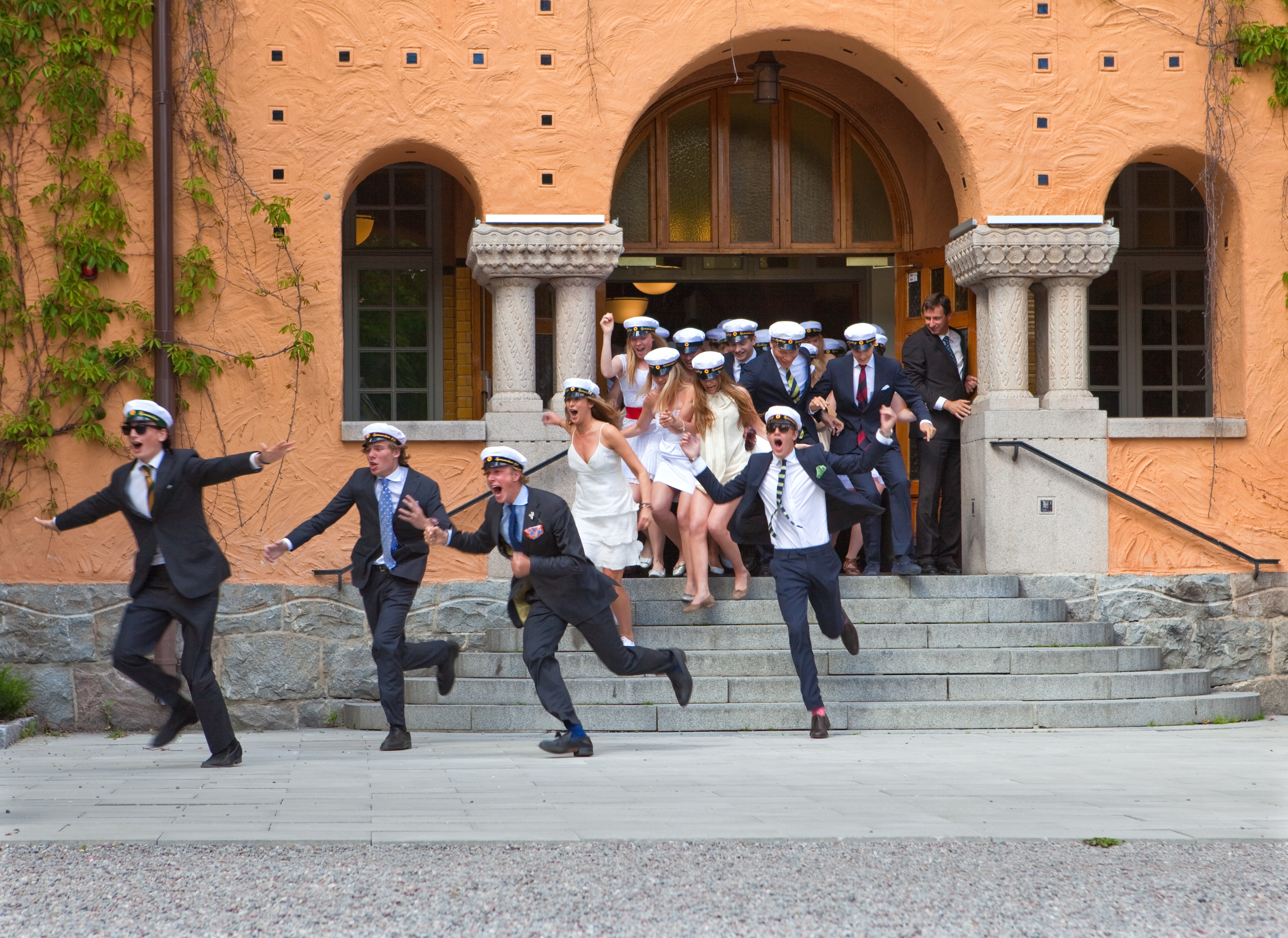 Studentexamen 2010 vid Viktor Rydbergs Gymnasium, Djursholm.